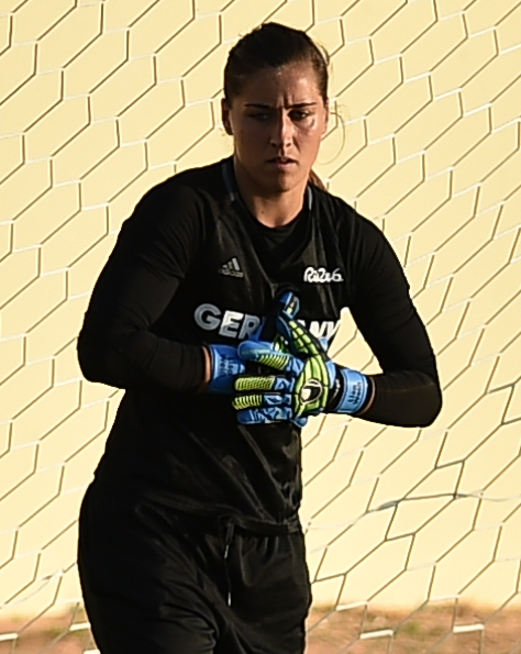 Estádio Maria de Lourdes Abadia (Abadião), Ceilândia, Brasília, DF, Brasil 8/8/2016 Foto: Andre Borges/Agência Brasília. A seleção feminina de futebol olímpico da Alemanha realizou treino leve no Estádio Abadião, em Ceilândia, na tarde desta segunda-feira (8).